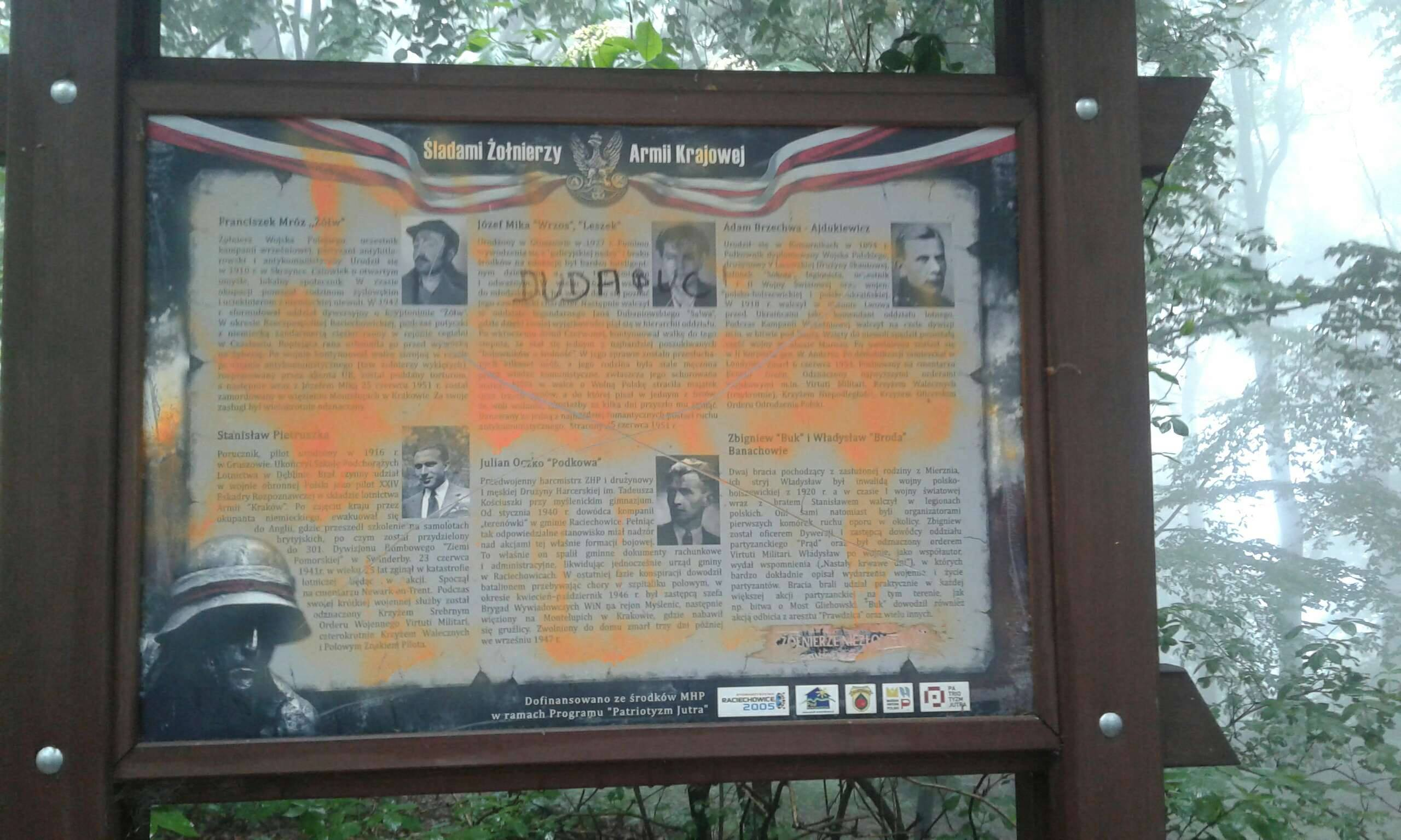 Zdewastowana tablica na szczycie góry Grodzisko w Beskidzie Wyspowym